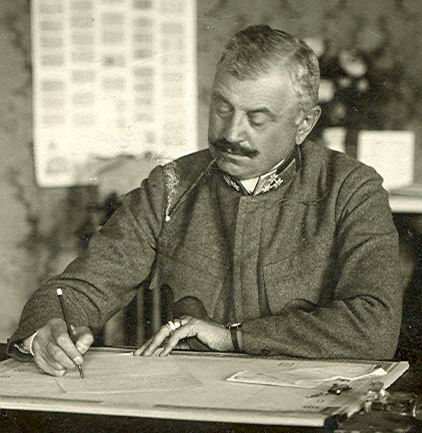 General pješaštva Anton Lipošćak (1863.-1924.)